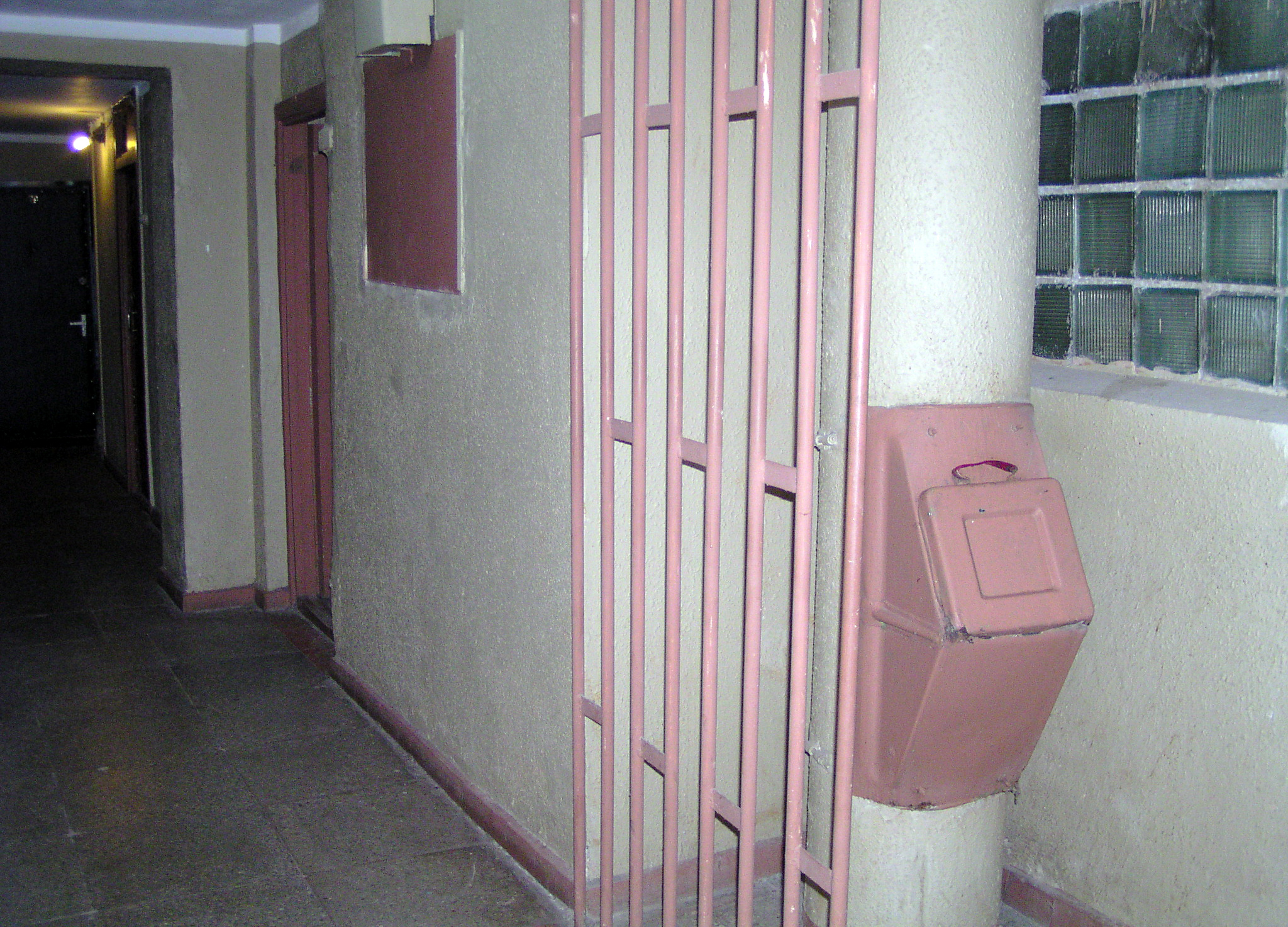 Müllschlucker in einem Ziegelsteinhaus in Moskau (ungepflickt)